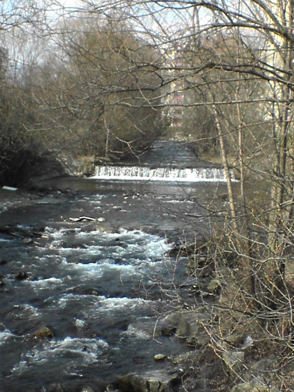 Smrečianka River in Podbreziny